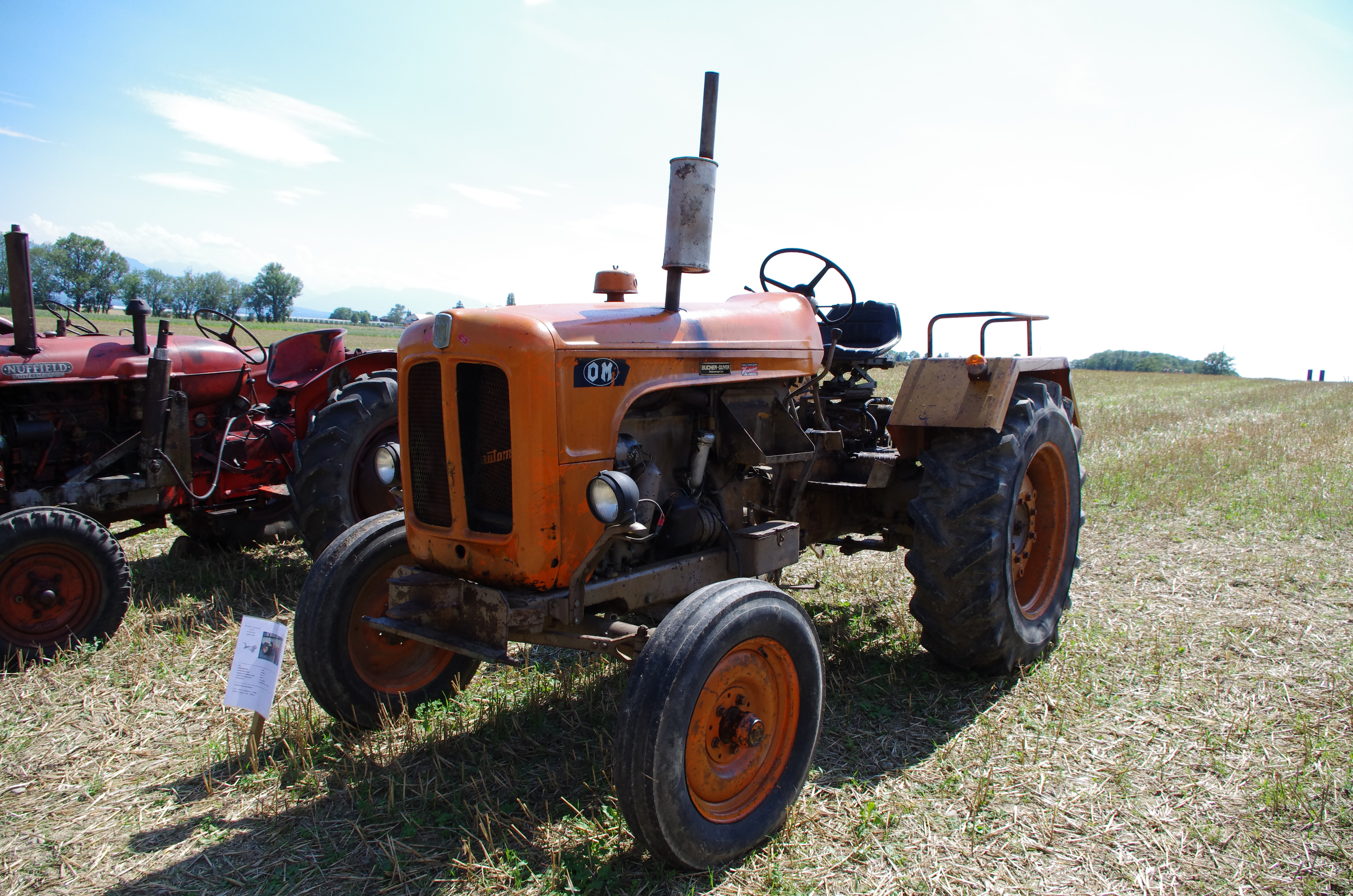 Tracteur Fiat 513 R - 1964 - gauche